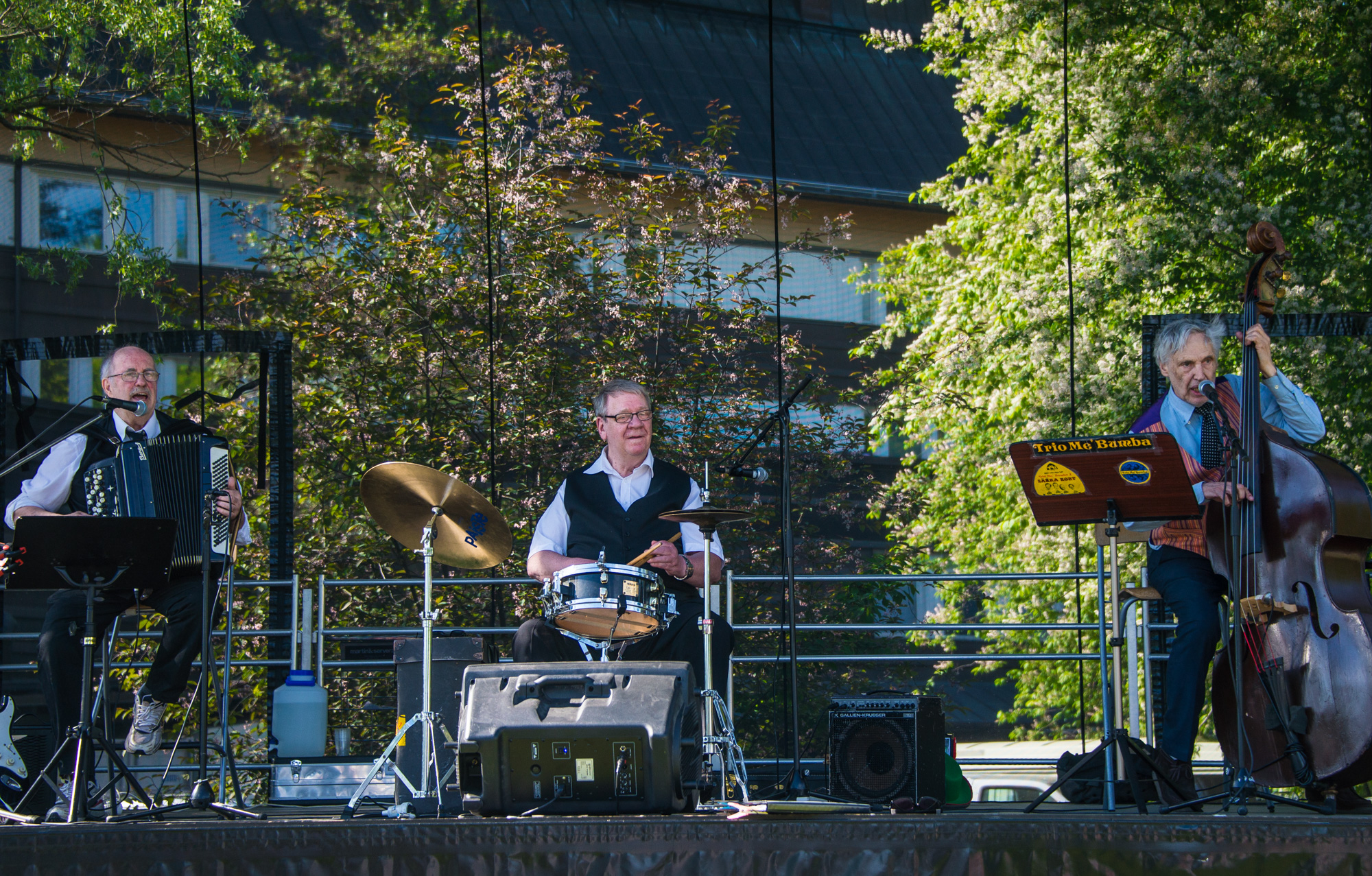 Trio me' Bumba på Djurgården i Stockholm den 27 maj 2017 under Sverigedagarna.